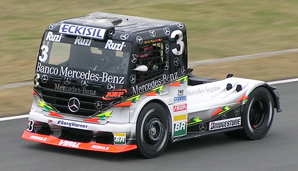 Fórmula Truck 2006 Rd.3 Interlagos: #3 Geraldo Piquet